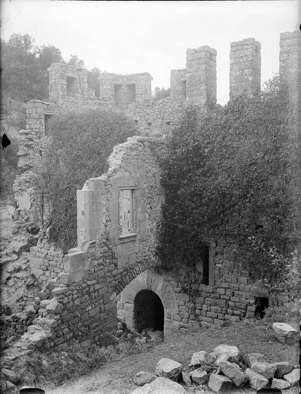 Vista de les ruïnes del castell de Centelles. Enric Ribas i Virgili (Entre 1920 i 1930)